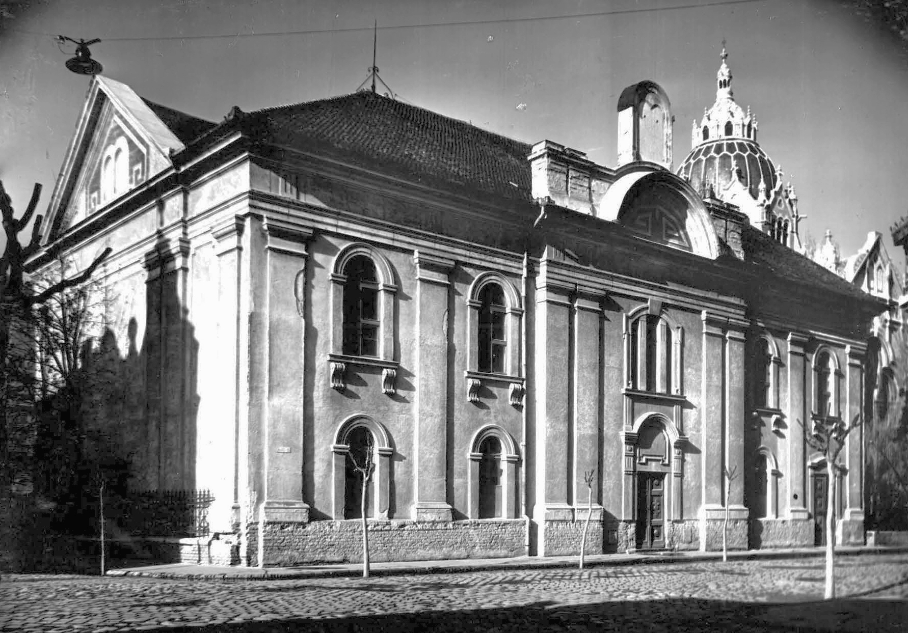 Hajnóczy utca 12., régi zsinagóga és mögötte az Új zsinagóga kupolája. Location: Hungary, Szeged Tags: synagogue Title: Hajnóczy utca 12., régi zsinagóga és mögötte az Új zsinagóga kupolája.